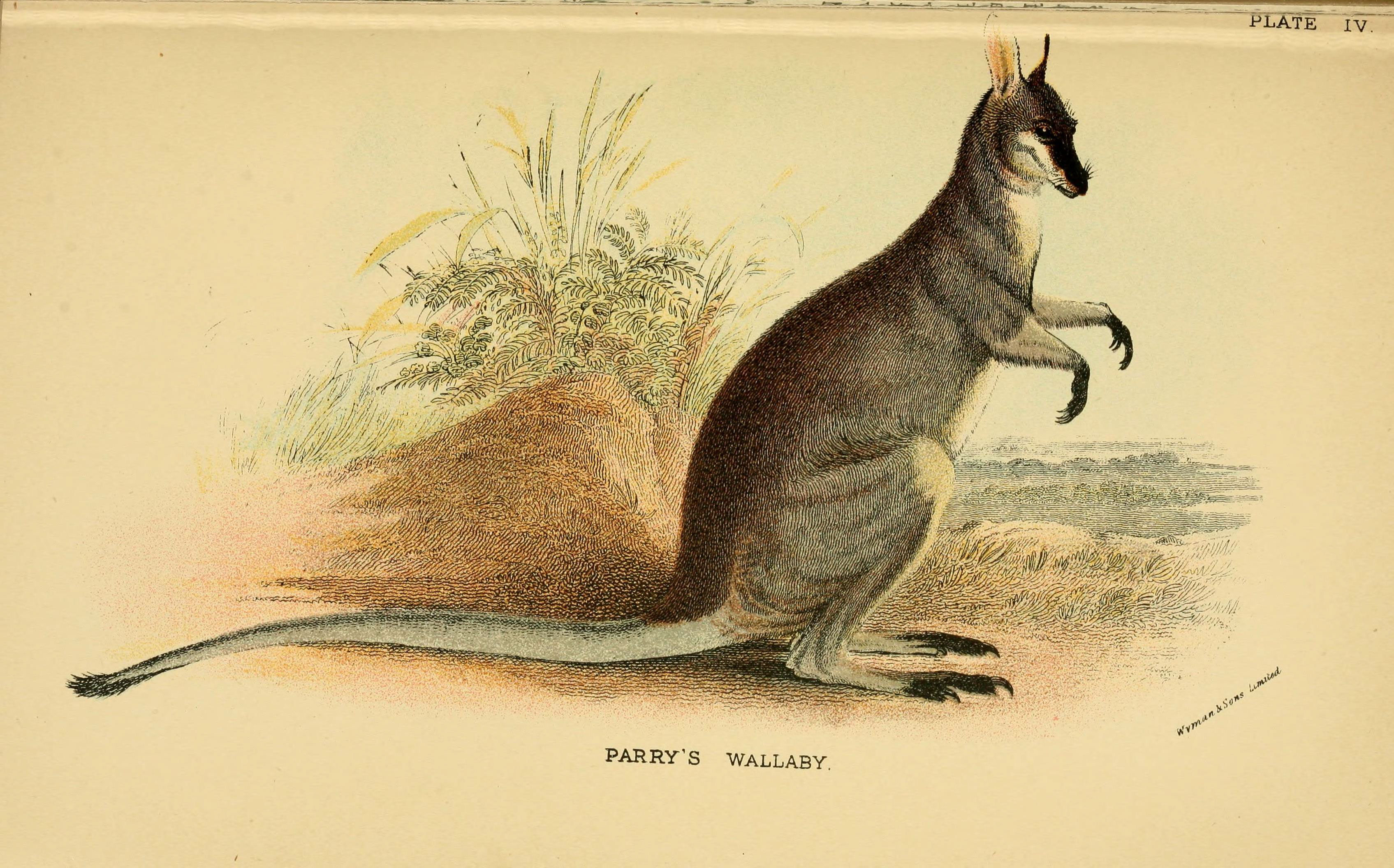 m . CO Pi